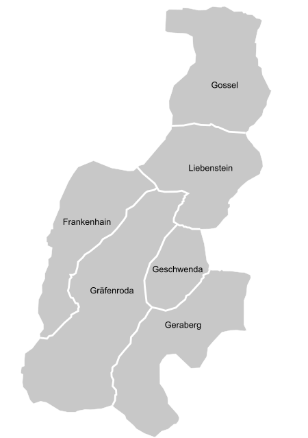 Ortseile von Geratal